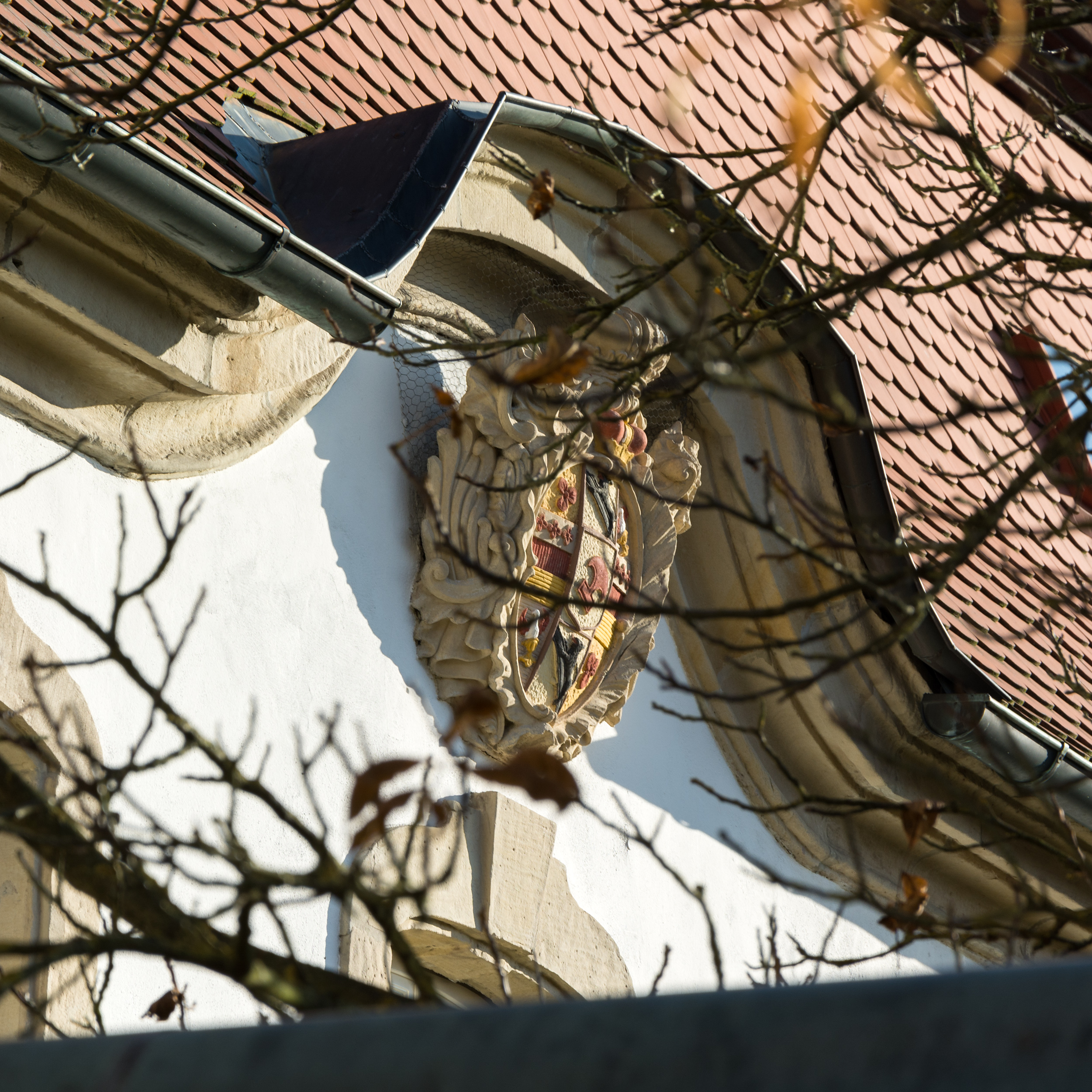 Wappen des Bamberger Fürstbischofs Johann Philipp Anton von und zu Frankenstein an der Westseite des Katholischen Pfarrhofs, Melchior-Otto-Platz 9, in Kronach.